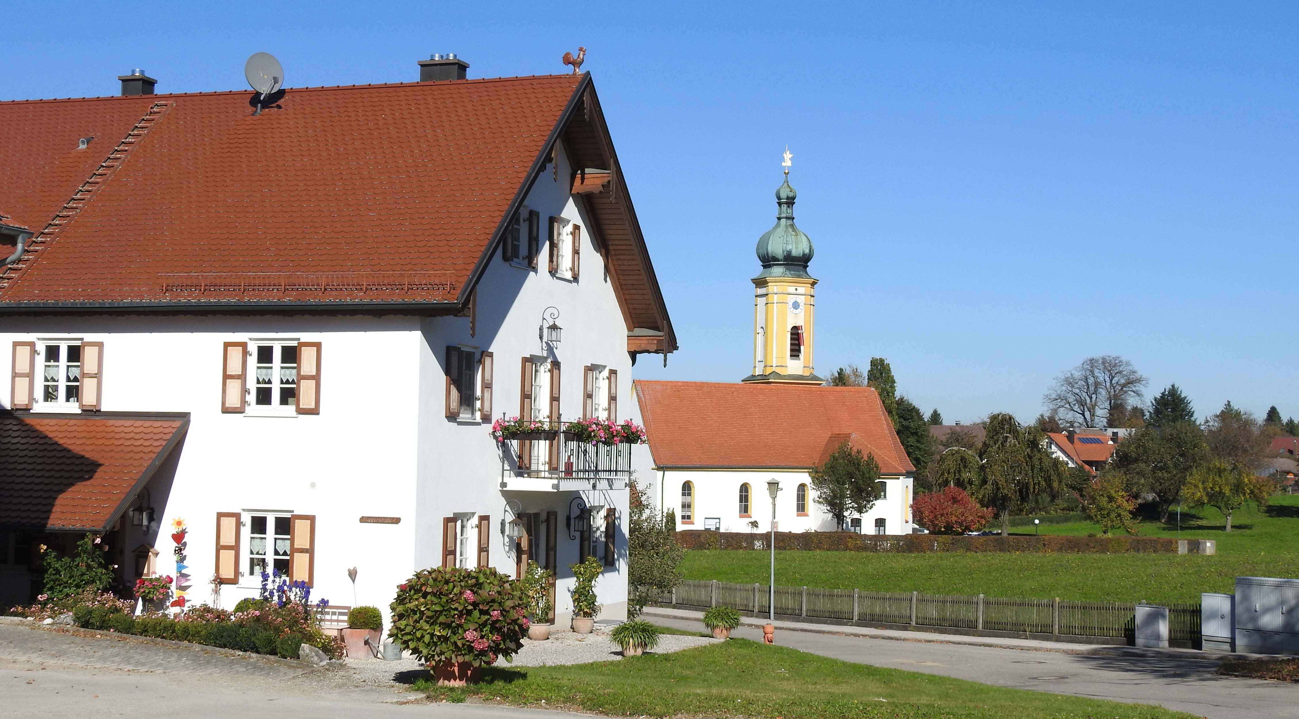 Fuggerstr. 4 und Pfarrkirche in Adelshofen